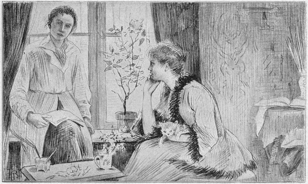 Gegen das Fenster